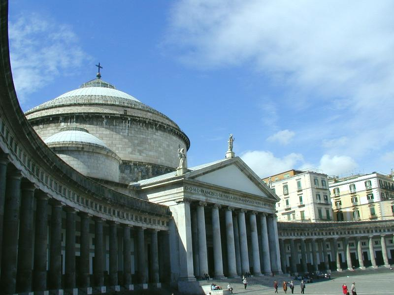 Napoli, piazza Plebiscito. La piazza è stata architettata nel 1400.